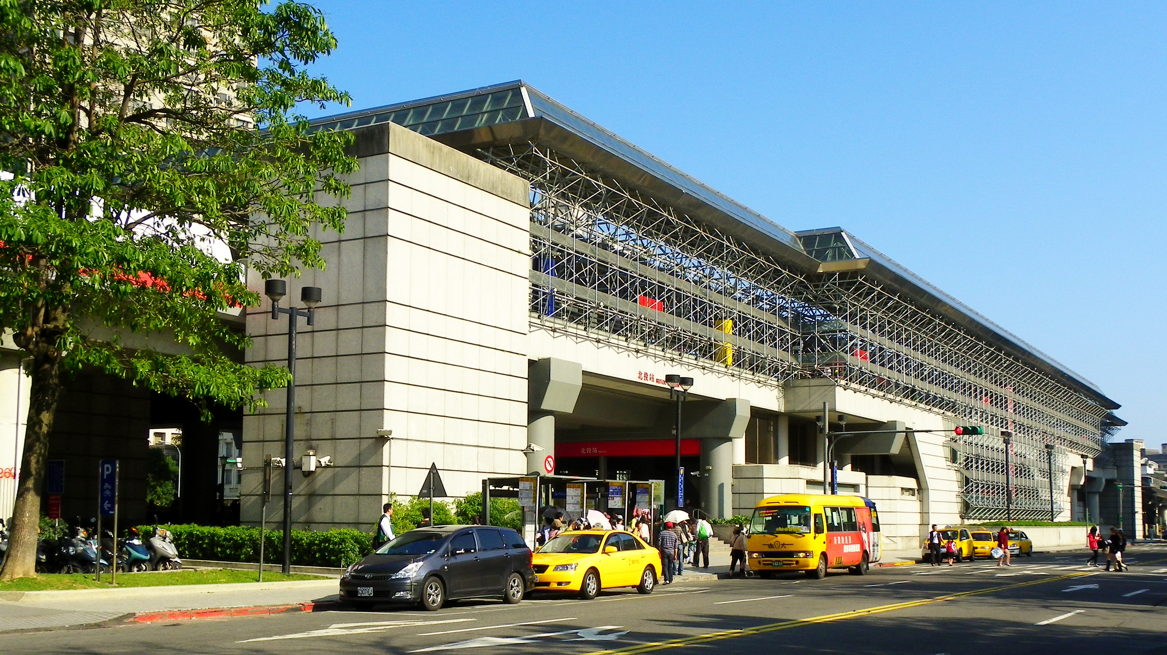 台北捷運淡水線北投駅西側の全景。